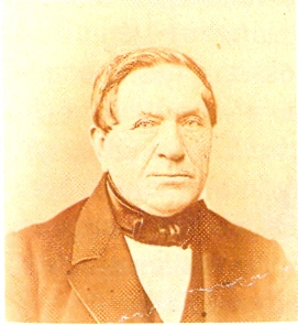 Siedlung Eisenheim Hermann Wilhelm Lueg (1792 - 1864)